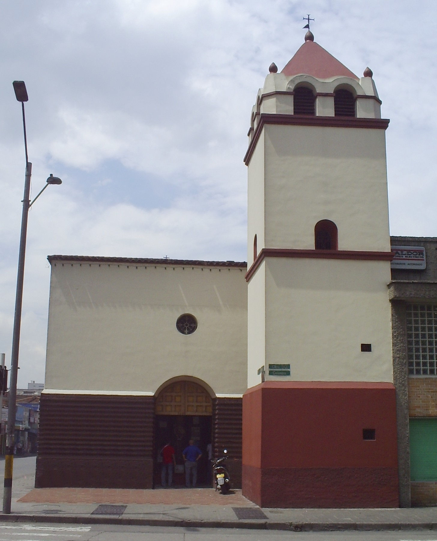 Iglesia de San Juan de Dios, Medellín, Colombia.